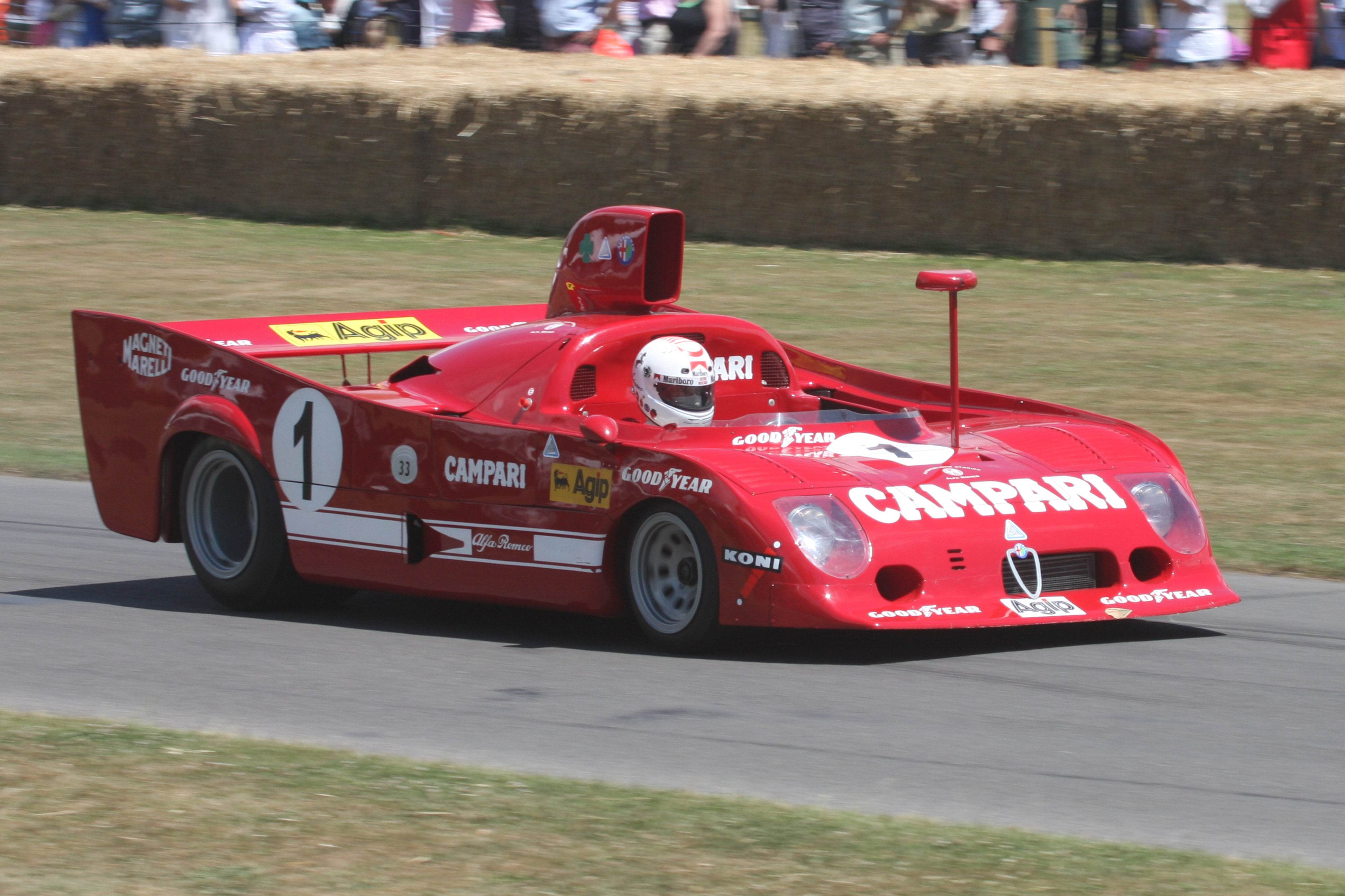 1975 Alfa Romeo Typo 33 TT 12